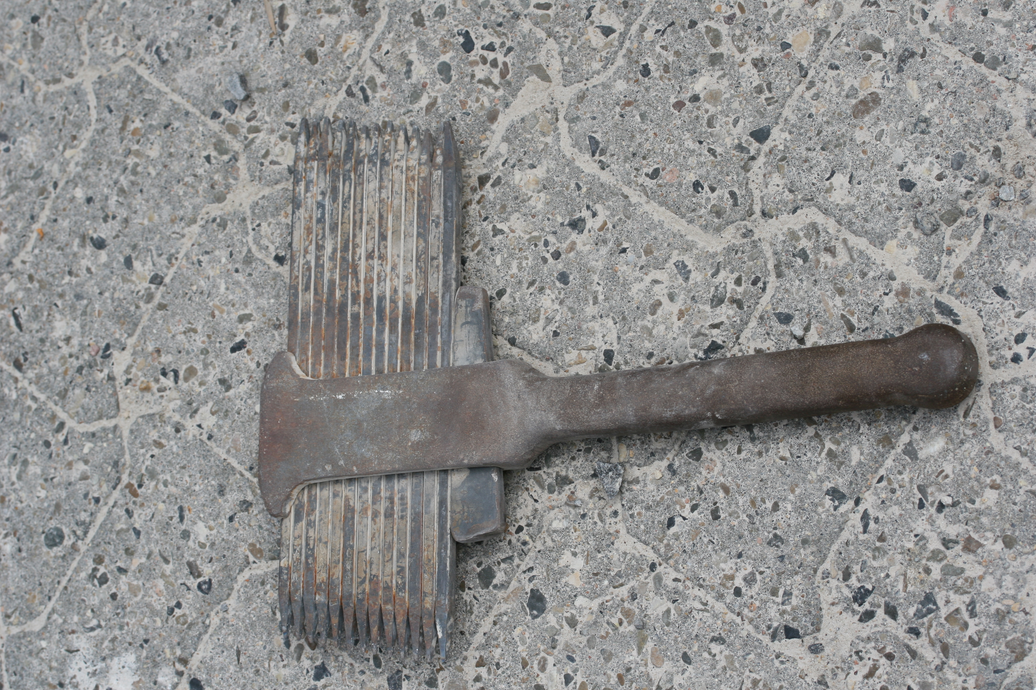 Krönel